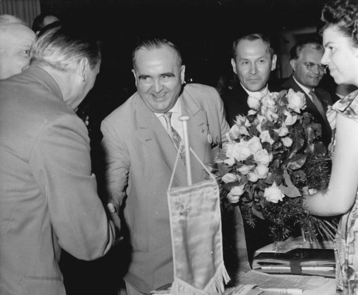 Zentralbild Krüger We-Krz. 26.6.1960 CDU Parteitag: August Bach zum Vorsitzenden der CDU wiedergewählt. In geheimer Abstimmung wählten die Delegierten des 10. Parteitages der CDU am 25.6.1960 August Bach erneut zum Parteivorsitzenden. UBz: Max Seferin, Stellvertreter des Vorstitzenden des Ministerrates und Minister für Gesundheitswesen (links) beglückwünscht August Bach zu seiner Wiederwahl als Parteivorsitzender